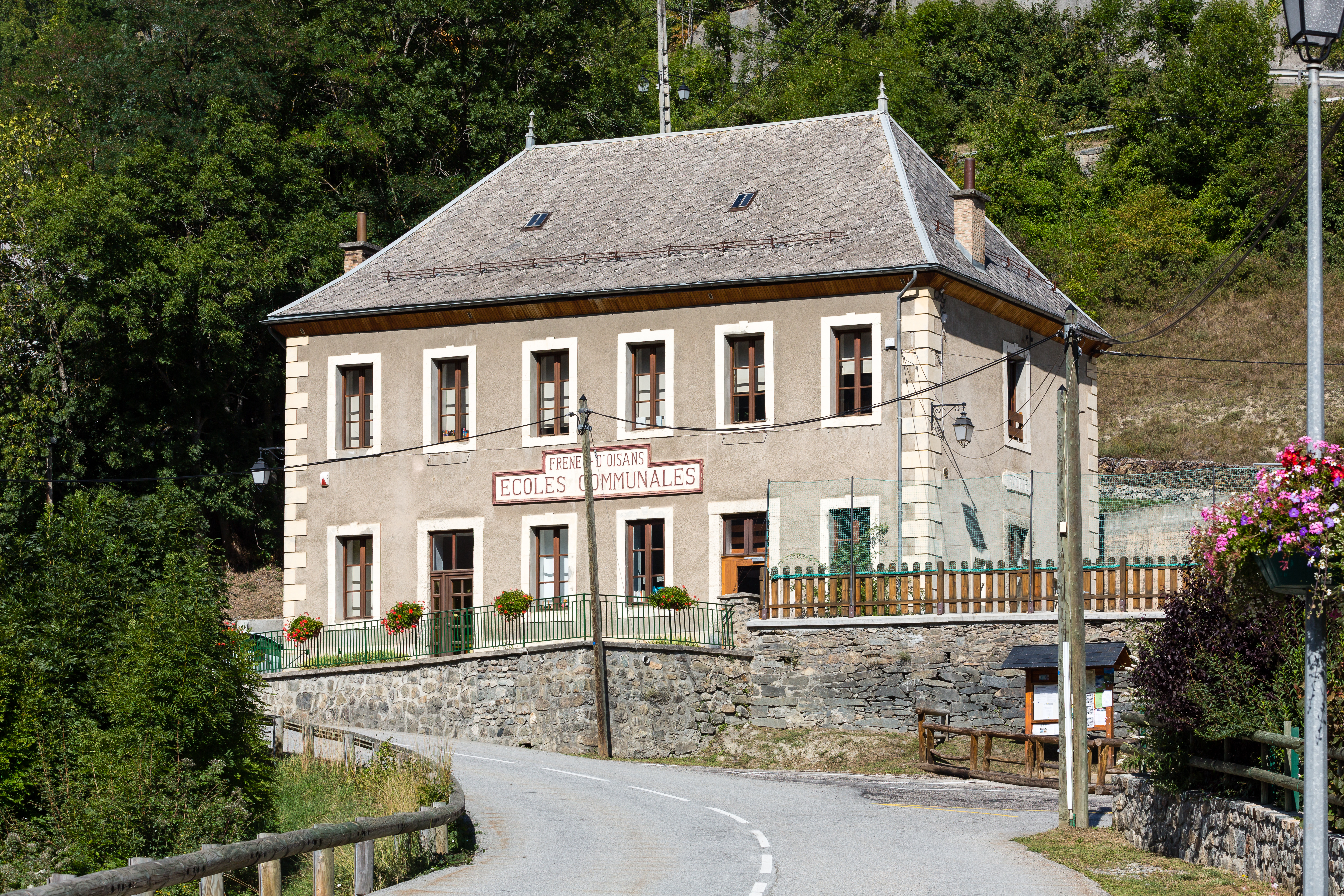 Mairie du Freney-d'Oisans (France).